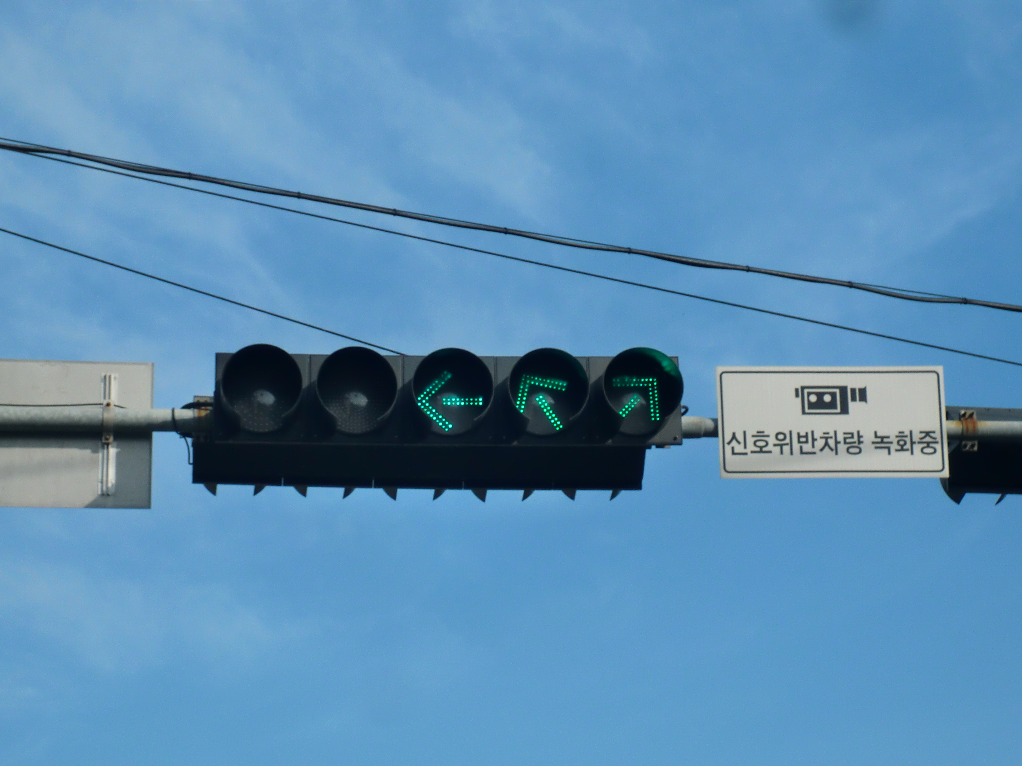 五色信号機（青左矢印と青左斜め矢印、青右矢印）密陽市で撮影